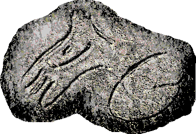 Grabados de Abri Cellier (Francia), ejemplo de las primeras manifestaciones de Arte en el paleolítico superior